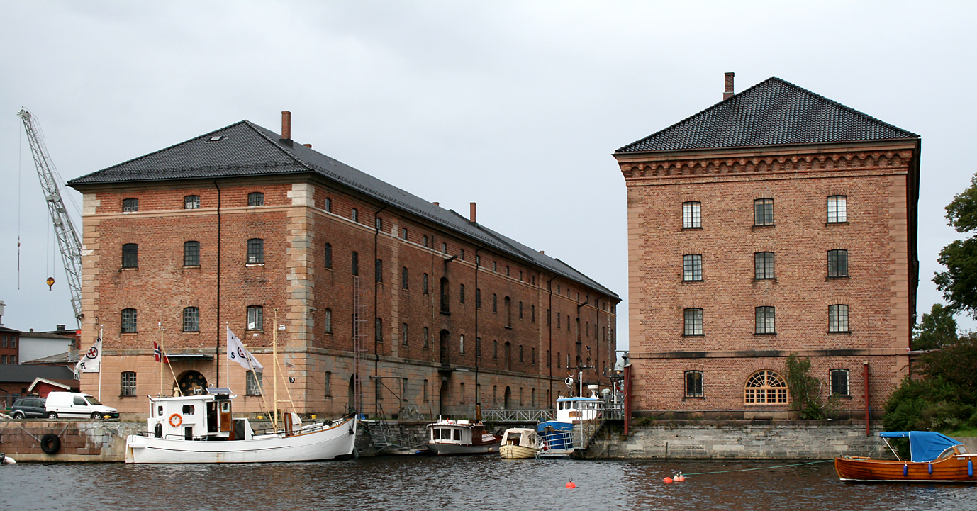 Magasinbygninger, Karljohansvern, Horten.